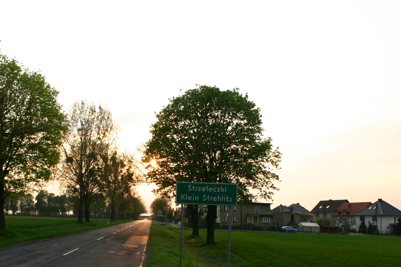 Strzeleczki Klein Strehlitz Object location50° 27′ 26″ N, 17° 51′ 48″ E